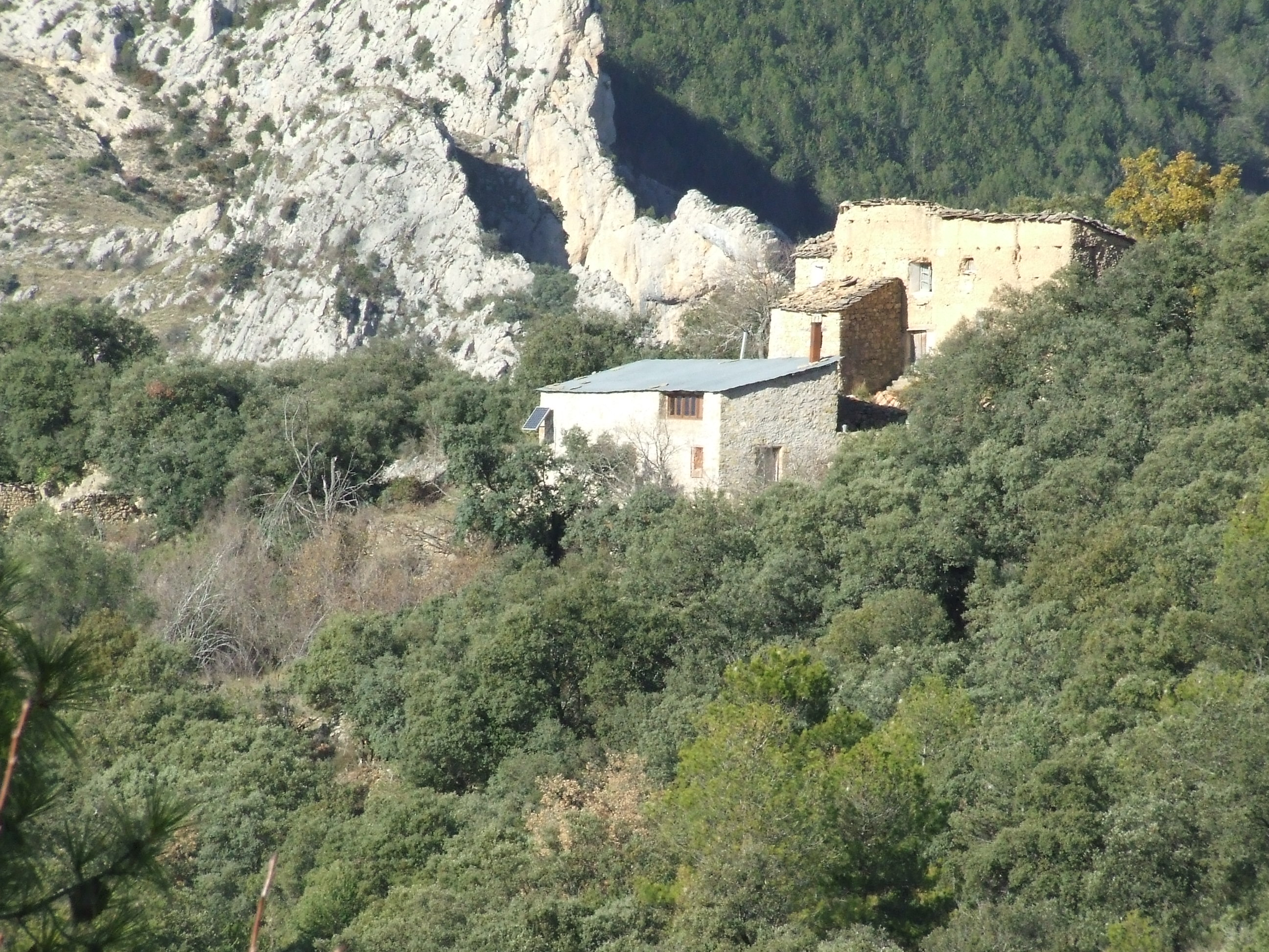 Cal Serret (Abella de la Conca, Pallars Jussà)